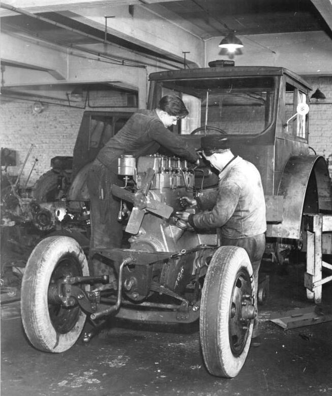 Oberlichtenau, Reparatur eines Traktors Zentralbild Schlegel 24.1.1958 MTS-Spezialwerkstatt verkürzt Stillstandszeiten der Traktoren In den Thesen der Politbüros der SED zur II. Zentralen MTS Konferenz wird die Bereitstellung einzelner Baugruppen von Traktoren und Landmaschinen zum Austausch für MTS, VEG und LPG gefordert. Dieser Hinweis wird von der MTS Spezialwerkstatt Oberlichtenau bei Karl-Marx-Stadt bereits in die Tat umgesetzt. Gegenwärtig hat die Spezielwerkstatt 44 verschiedene Aggregate zum Austausch vorrätig. Es sind neben Traktoren - Motren Getriebe und komplette Traktoren vom Typ "Pionier". Die Stillstandszeit für einen Schlepper "Pionier" betrug bei der Generalreparatur etwa 3 Wochen. Jetzt erhält die Station in 5 bis 6 Stunden eine Maschine zurück. Nur das Nummernschild und die Räder werden ab- und an den Austausch-Schlepper anmontiert. - Die Generalreparatur der Traktoren wird von der Spezialwerkstatt auf einer Taktstrasse vorgenommen. Das brachte eine erhebliche Steigerung der Arbeitsproduktivität mit sich. Durch diese Methode kann täglich ein Fahrzeug generalüberholt werden. UBz: Die beiden Schlosser Berthold Bauer und Gerhard Rößner beim Einsetzen eines Austauschmotors in einen Schlepper "Pionier".